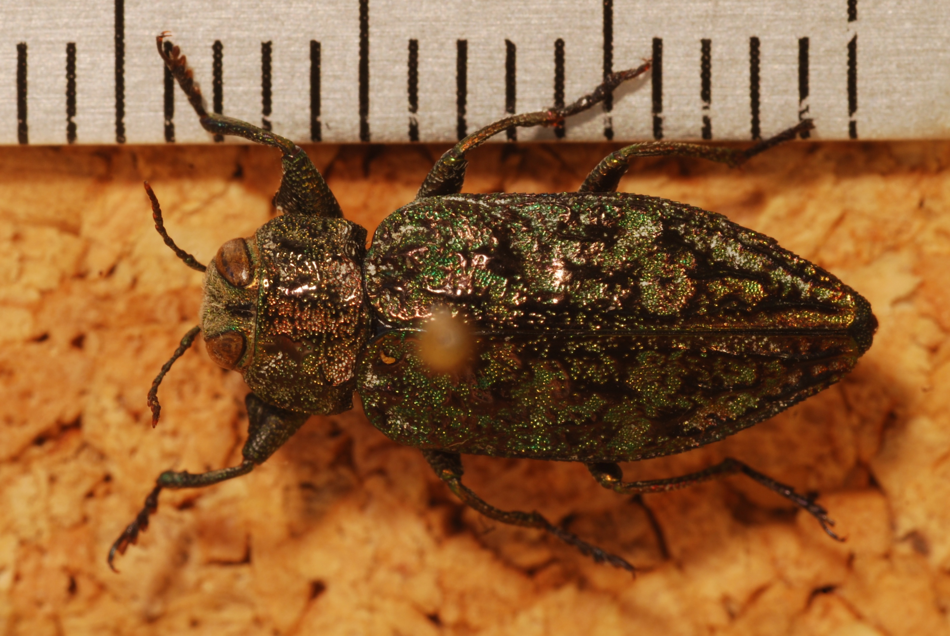 Saint Gilles, Québec, CANADA